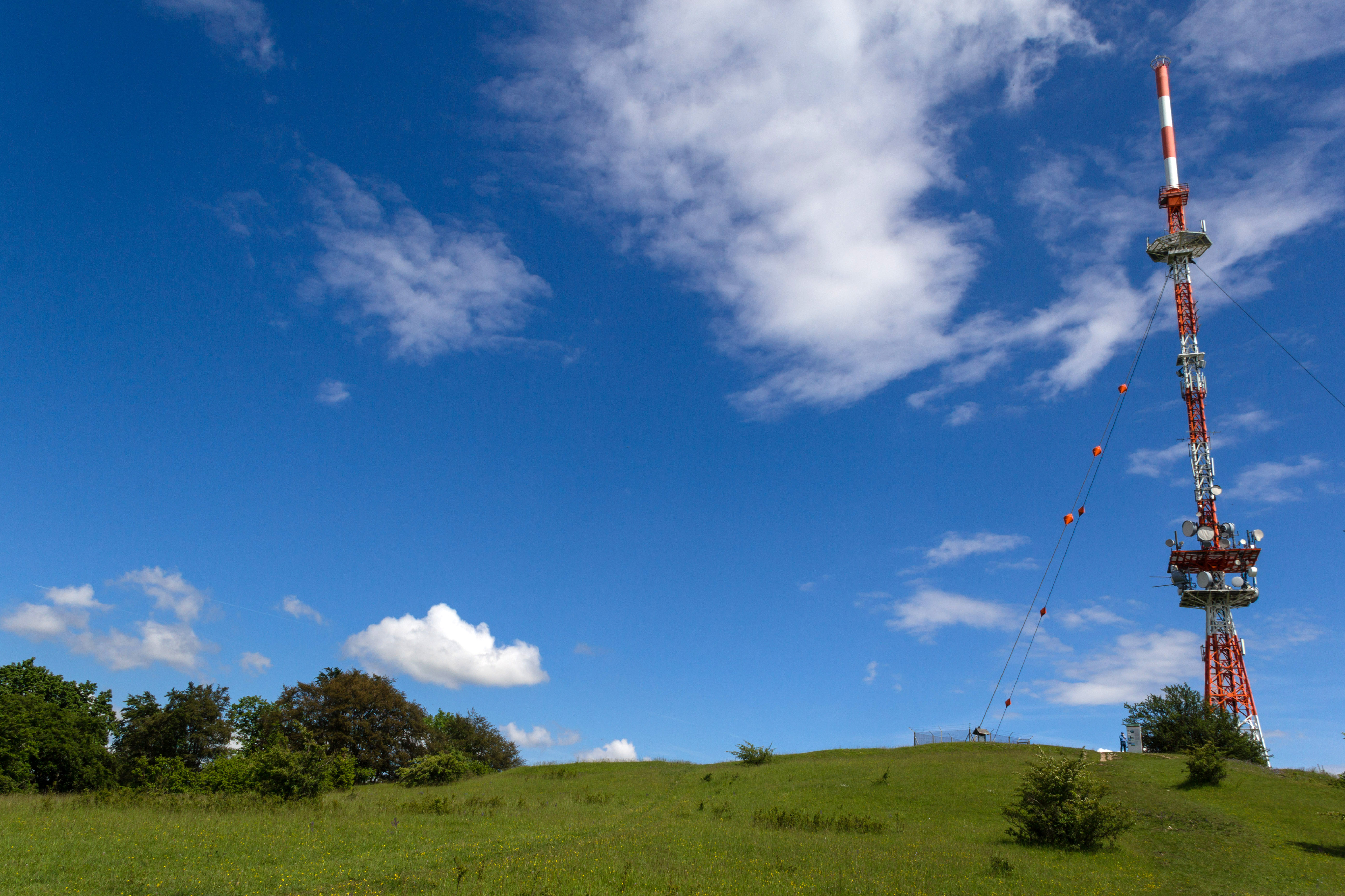 Hesselberg, Landschaftsschutzgebiet Hesselberg im Landkreis Ansbach